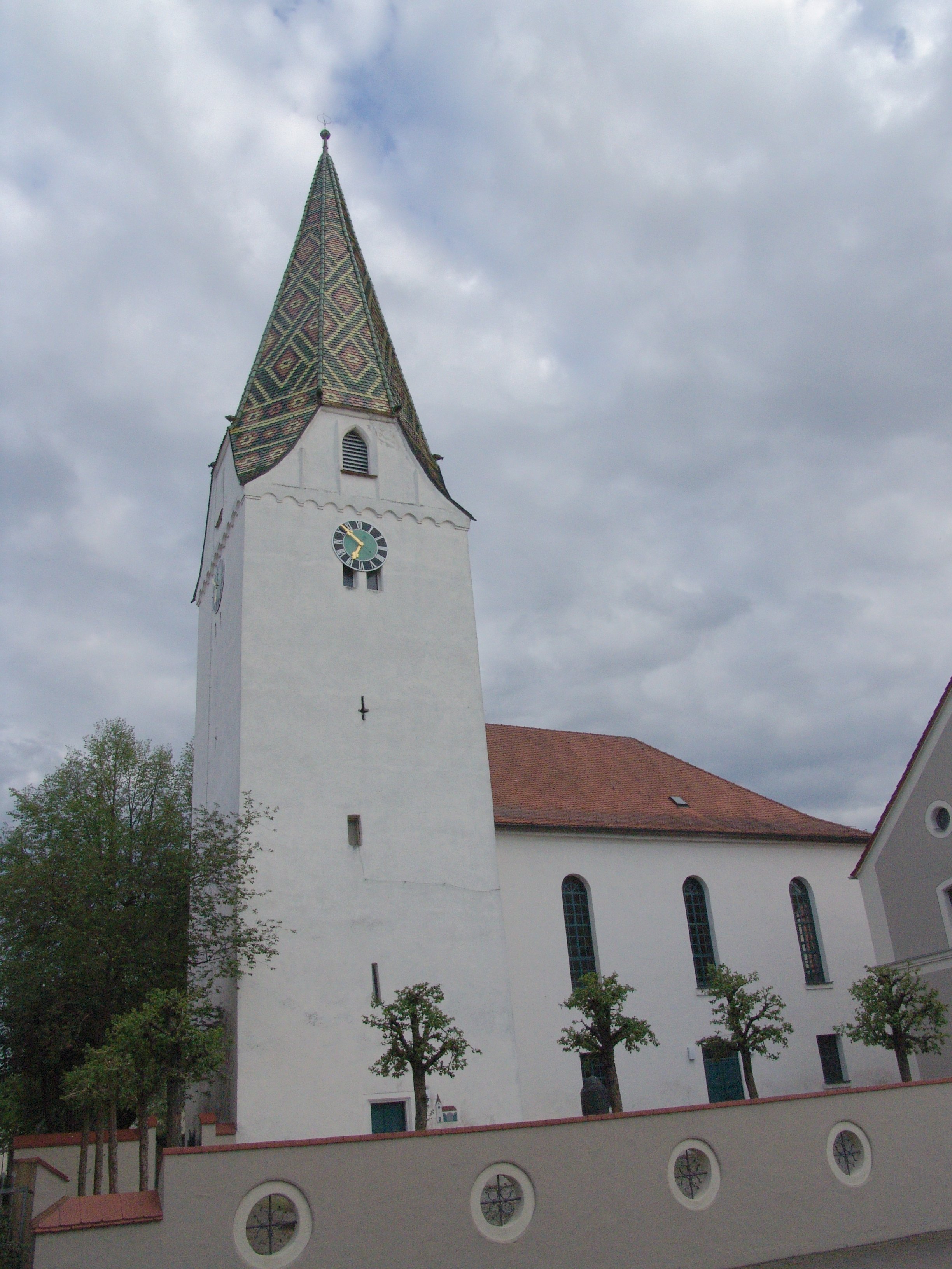 evang.-luth. Kirche St. Pankrazius in Westheim